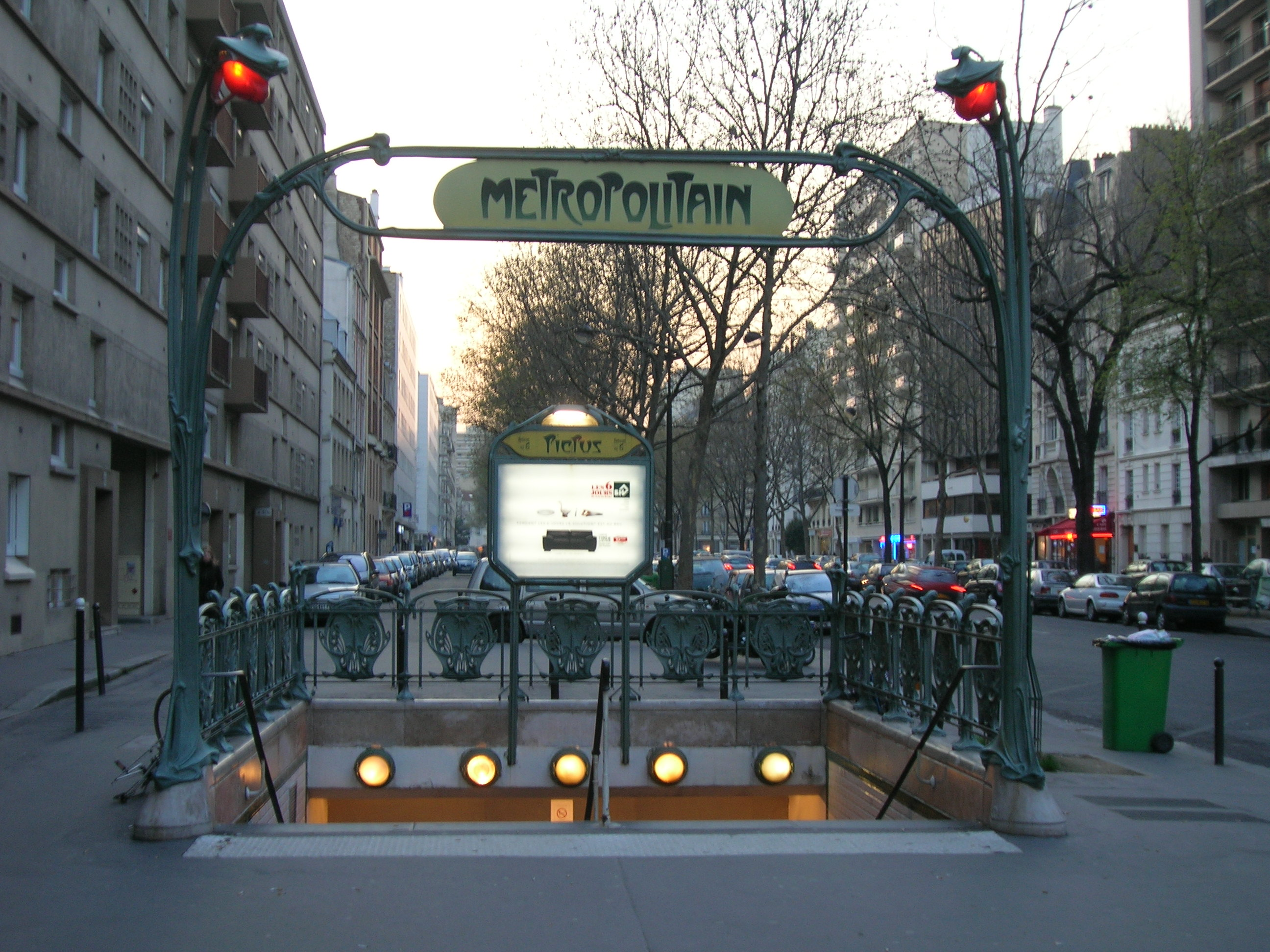 Entrée de la station de métro Picpus, ligne 6, 12e arrondissement de Paris, France